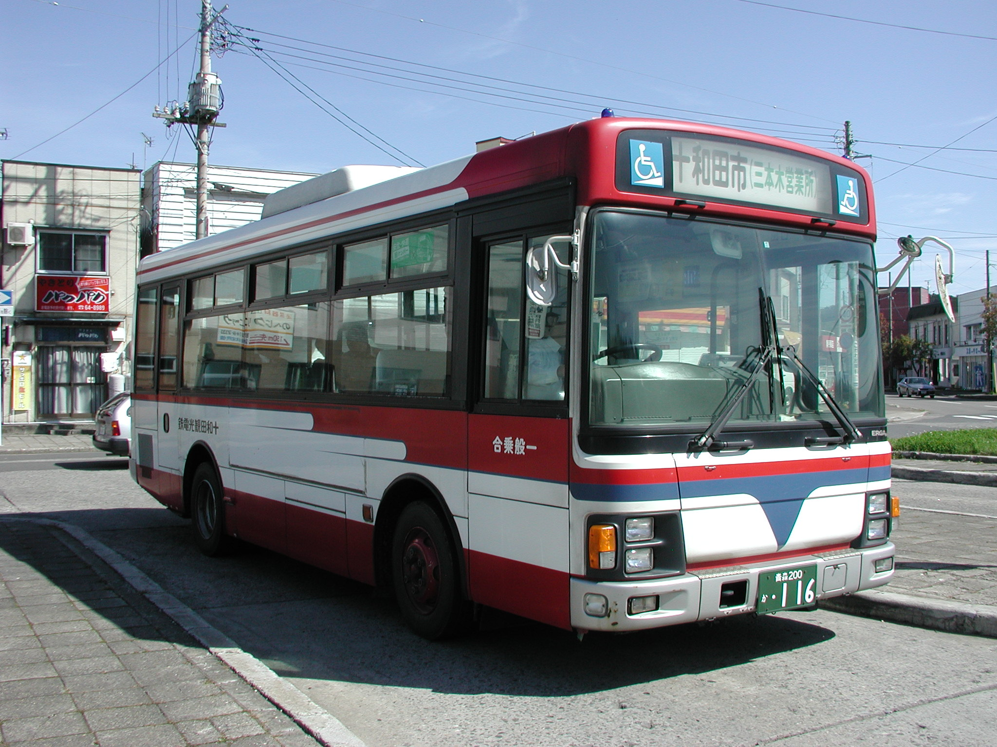 十和田観光電鉄バス 一般路線塗装：オリジナルカラー（いすゞ・エルガミオ：KK-LR233J1） 野辺地駅にて